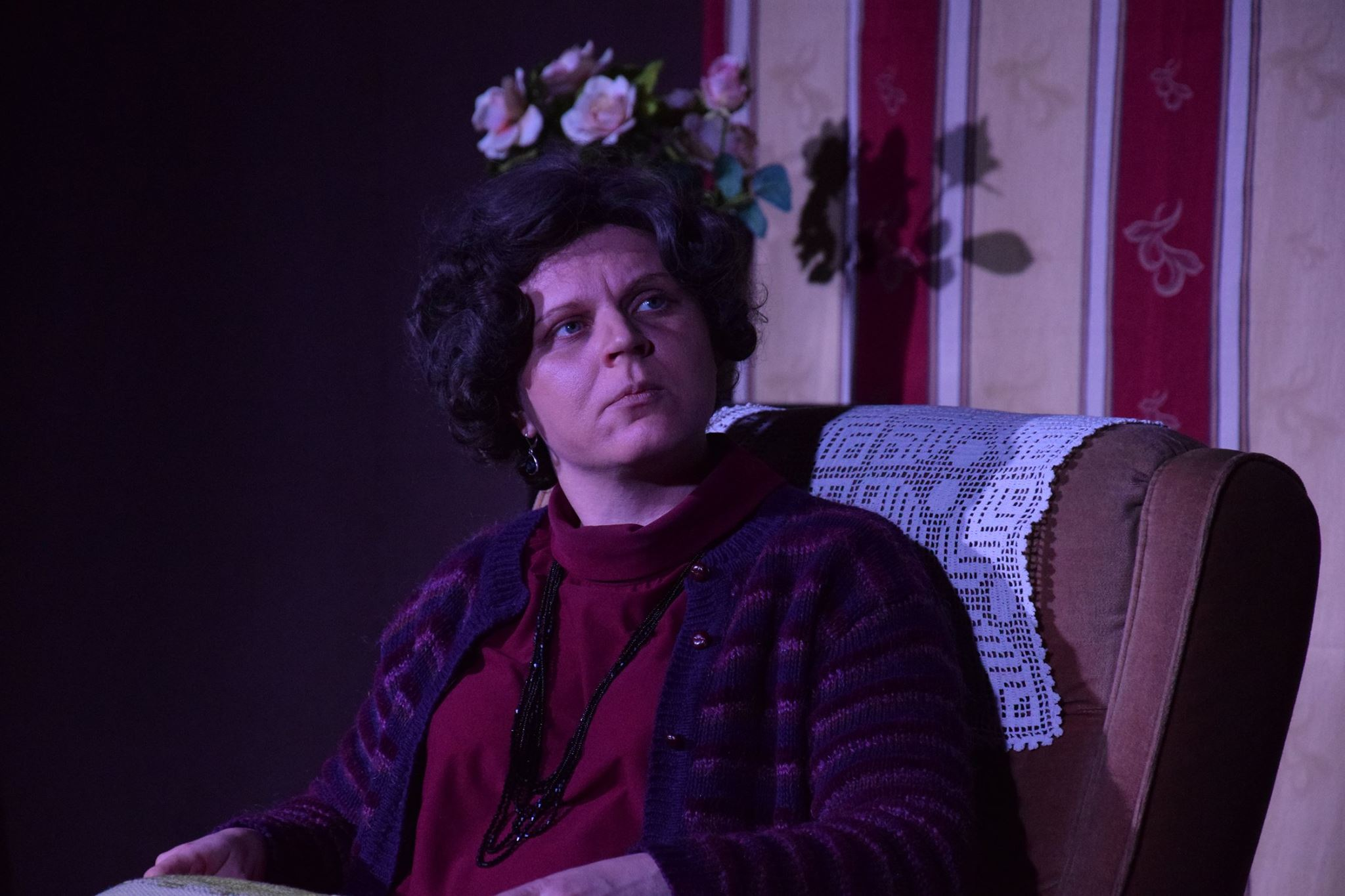 Mrs Bramson (Ingrid Ulst)